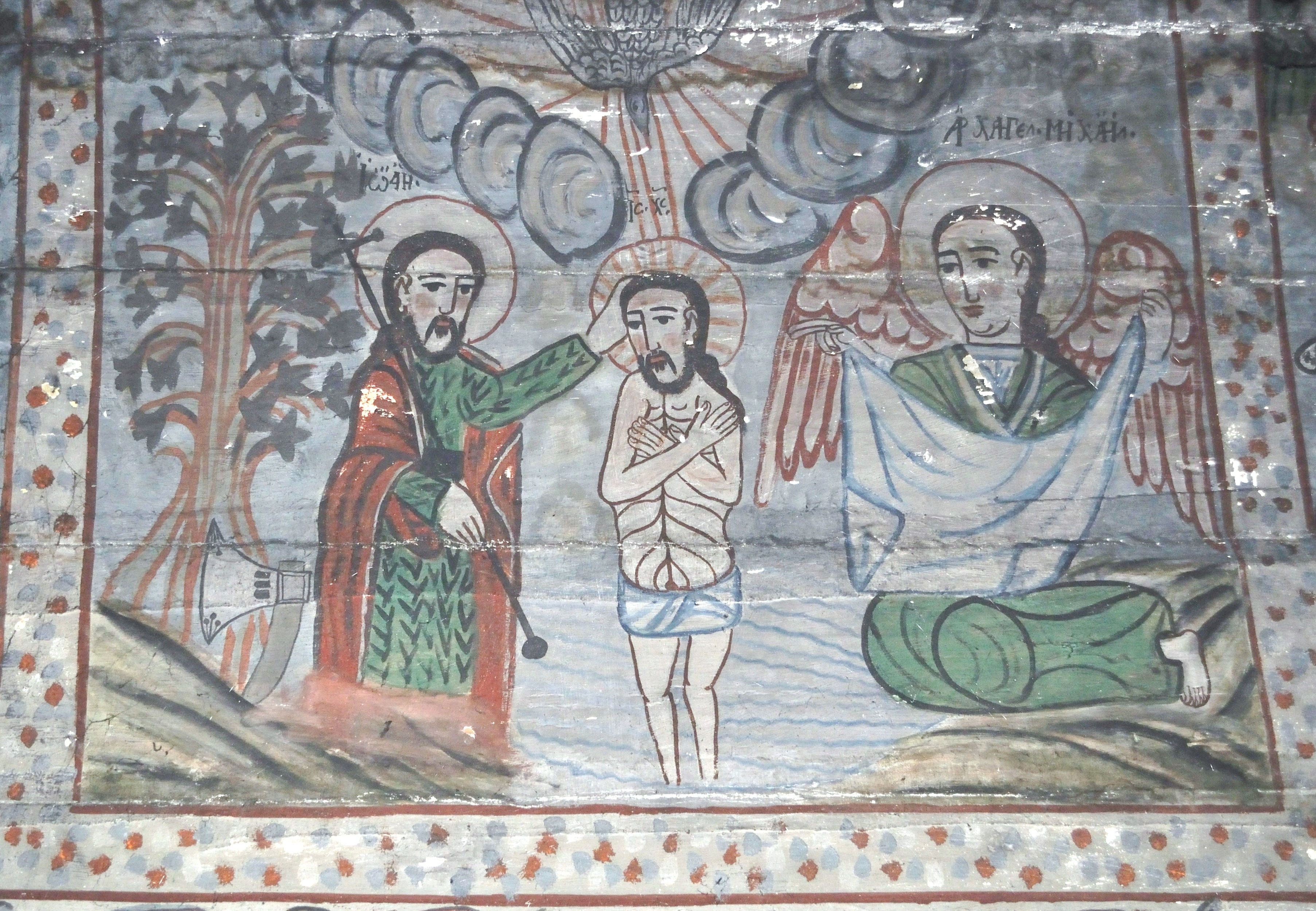 Biserica de lemn din Agârbiciu, județul Cluj